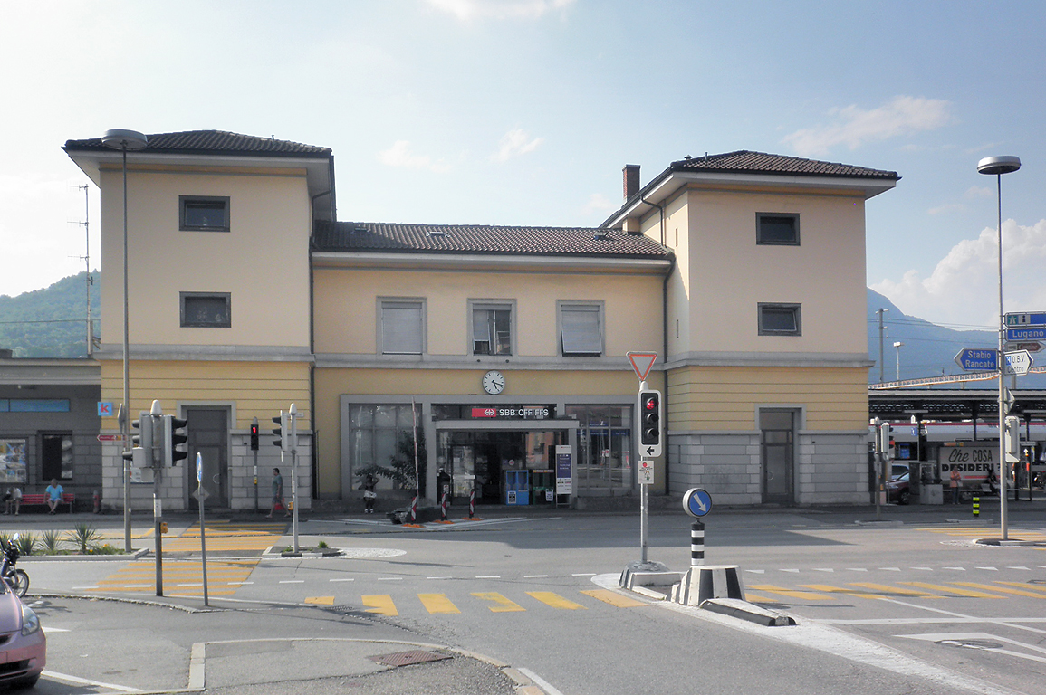 Stazione ferroviaria di Mendrisio.